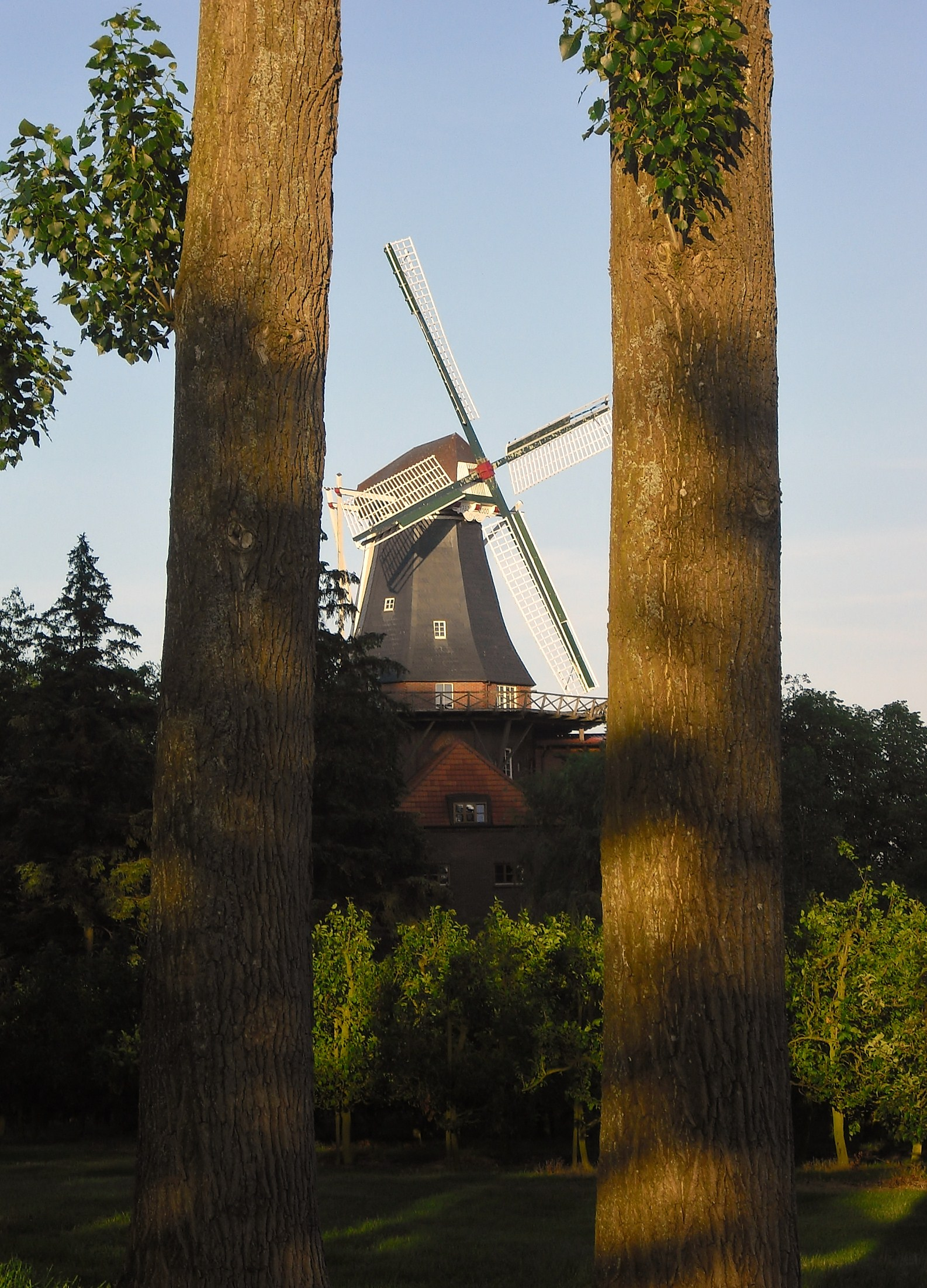 Windmühle Westeraccum (Ortsteil von Dornum, Landkreis Aurich)